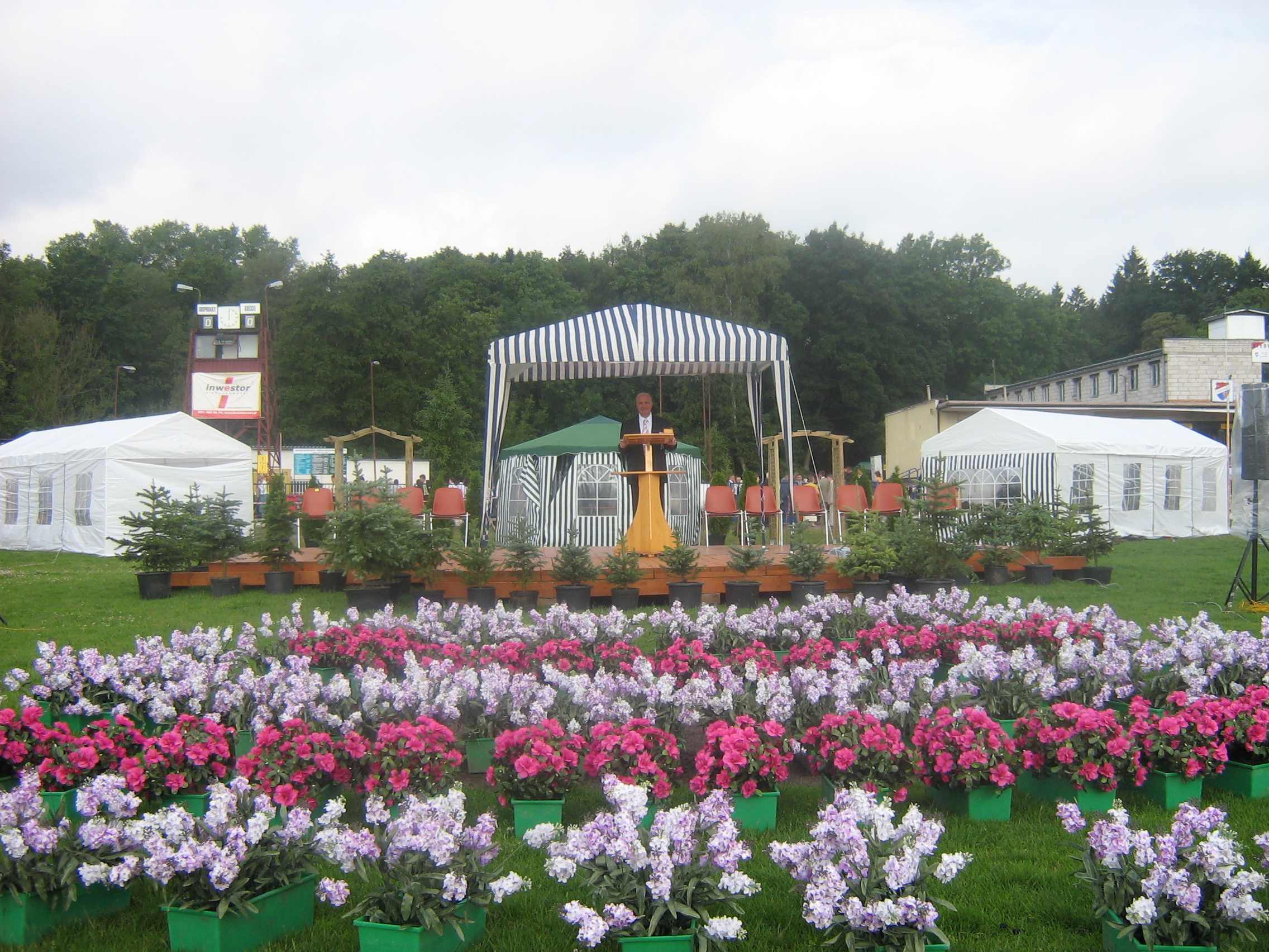 Mówca podczas przemówieniea na zgromadzeniu okręgowym w Szczecinie. 12 lipca 2008.